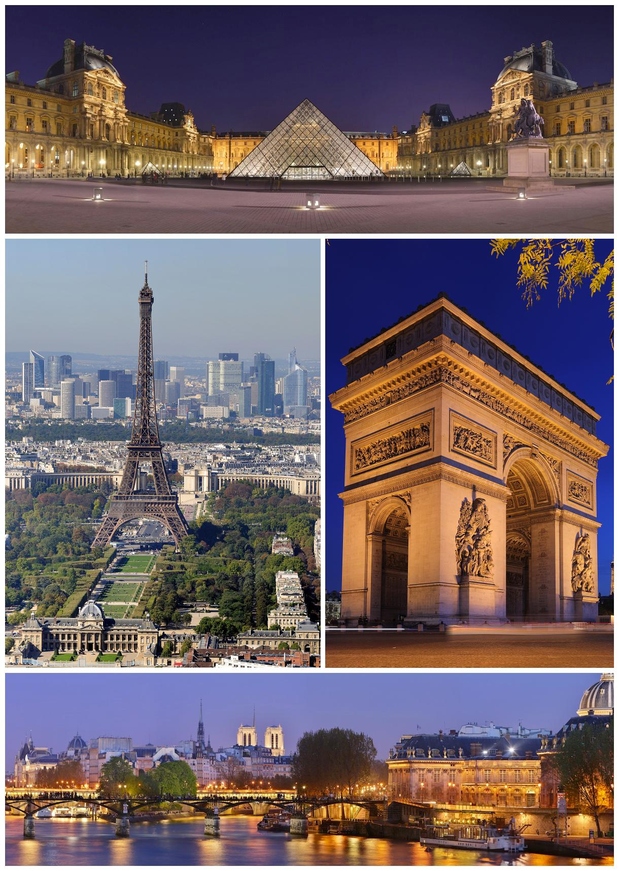 Paris